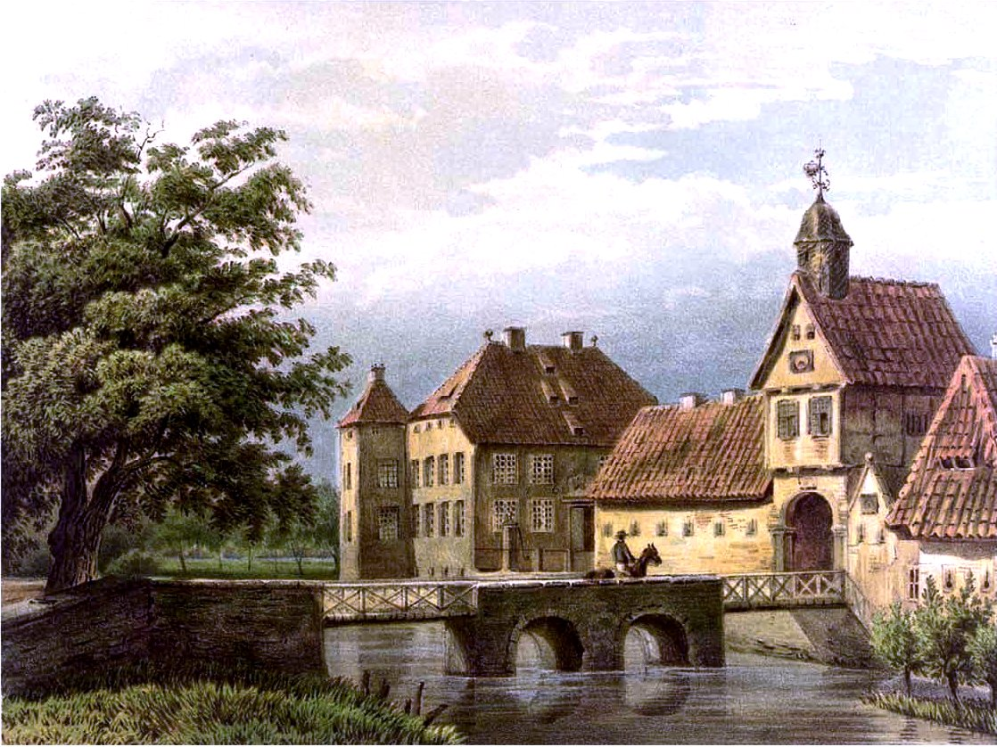 Gut Stockhausen, Lithografie aus dem 19. Jahrhundert